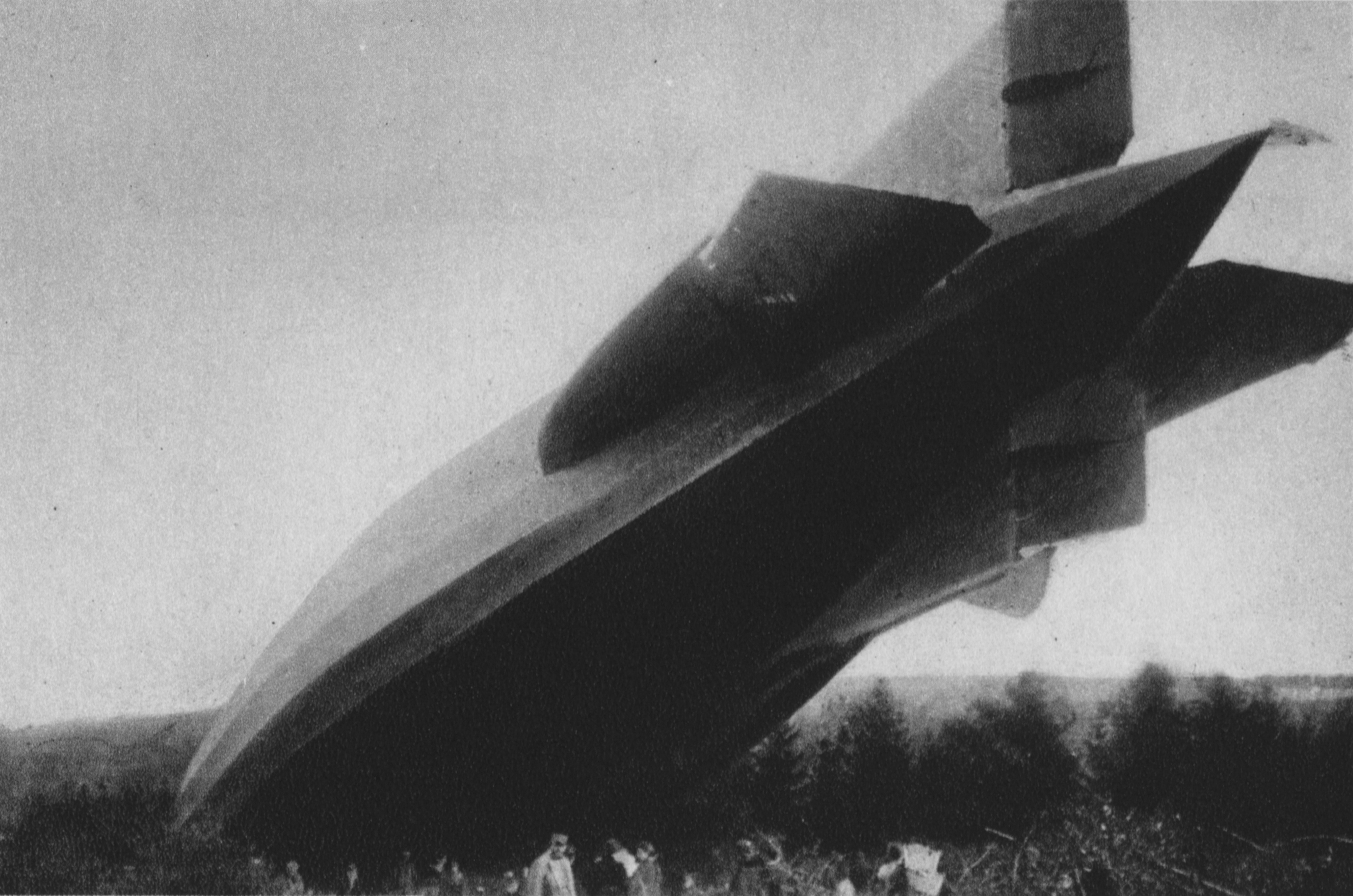 Zeppelin examiné par des militaires français et britanniques?